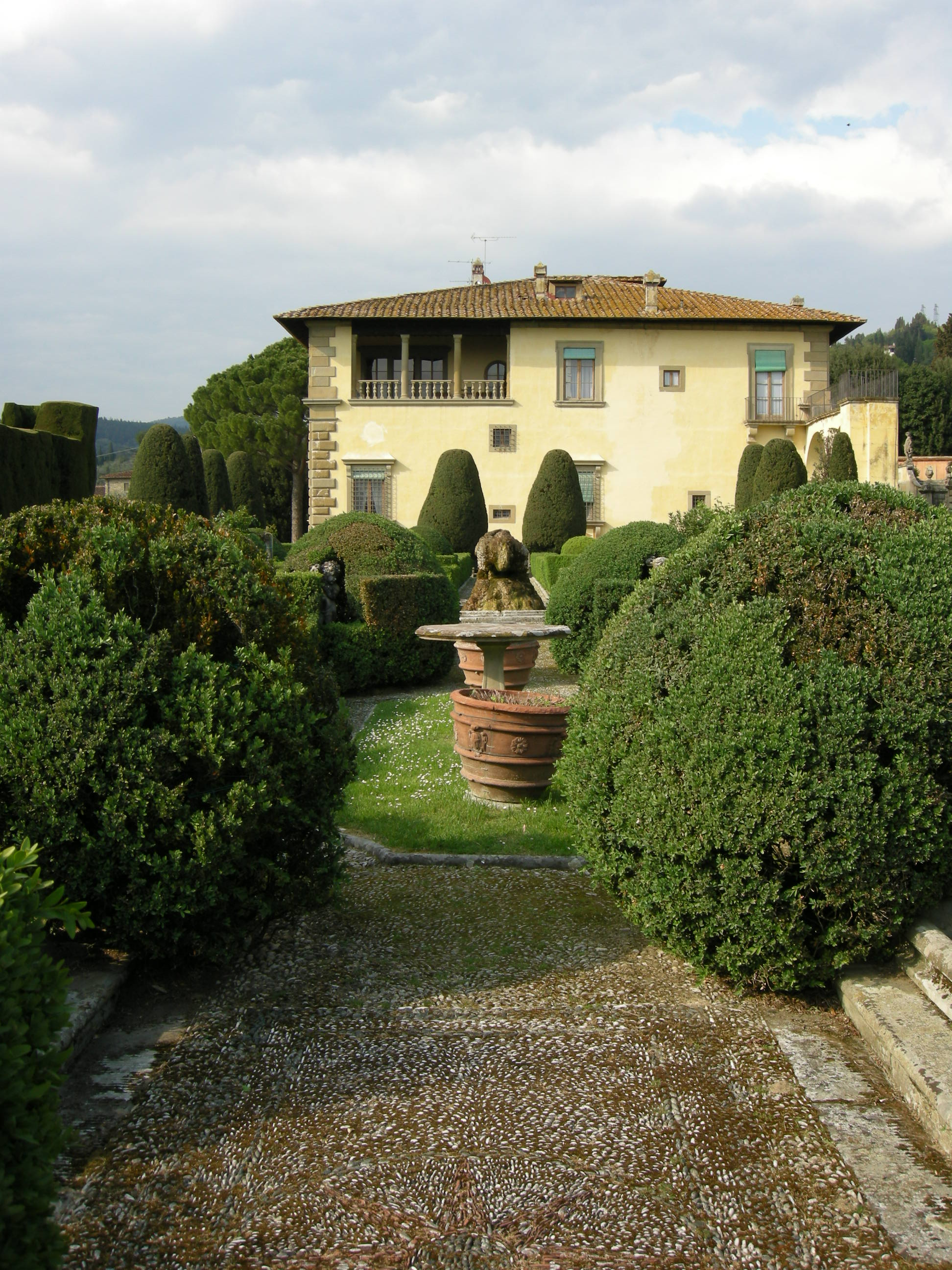 Villa gamberaia